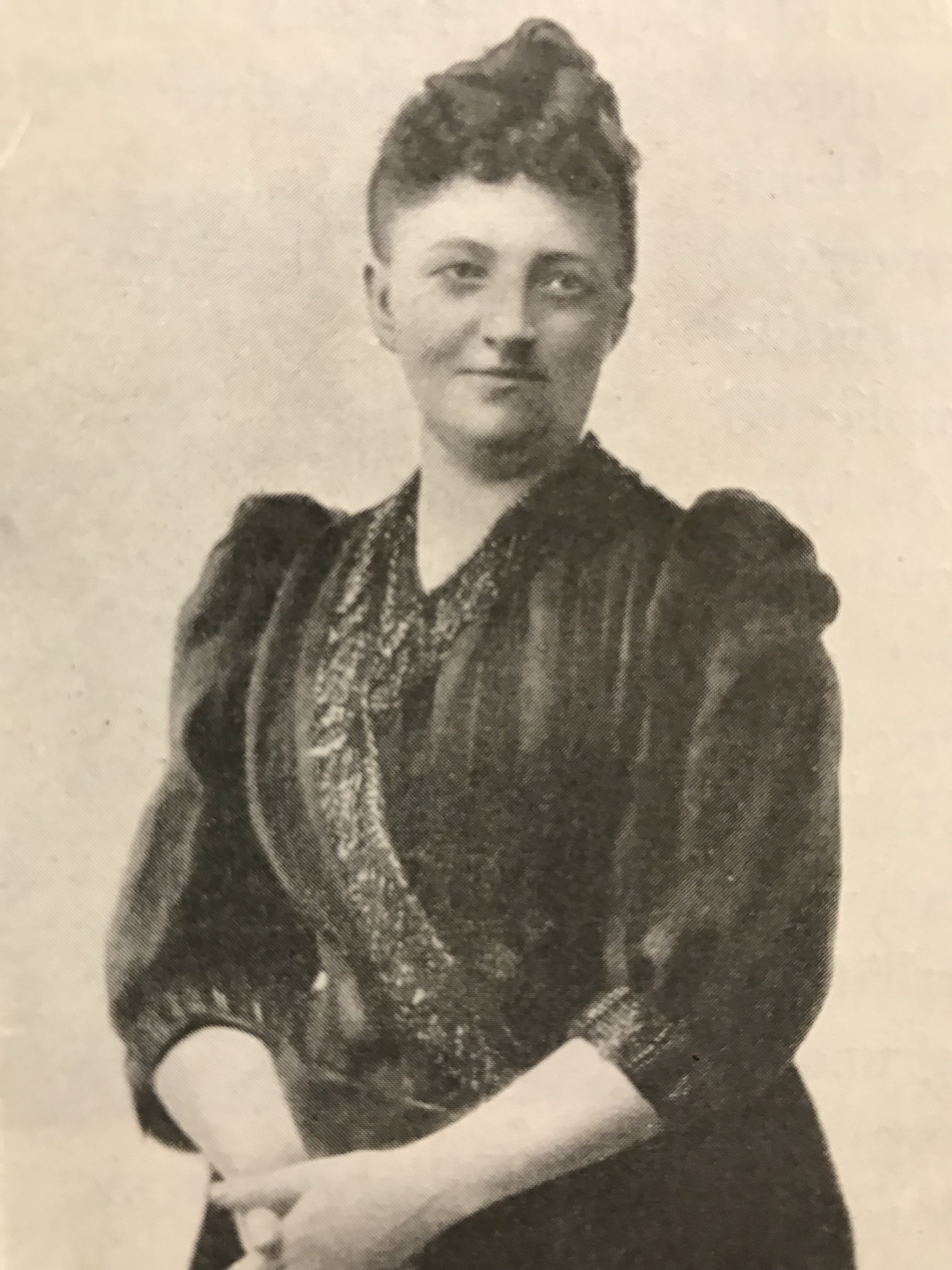 Pianisten Hilda Thegerström